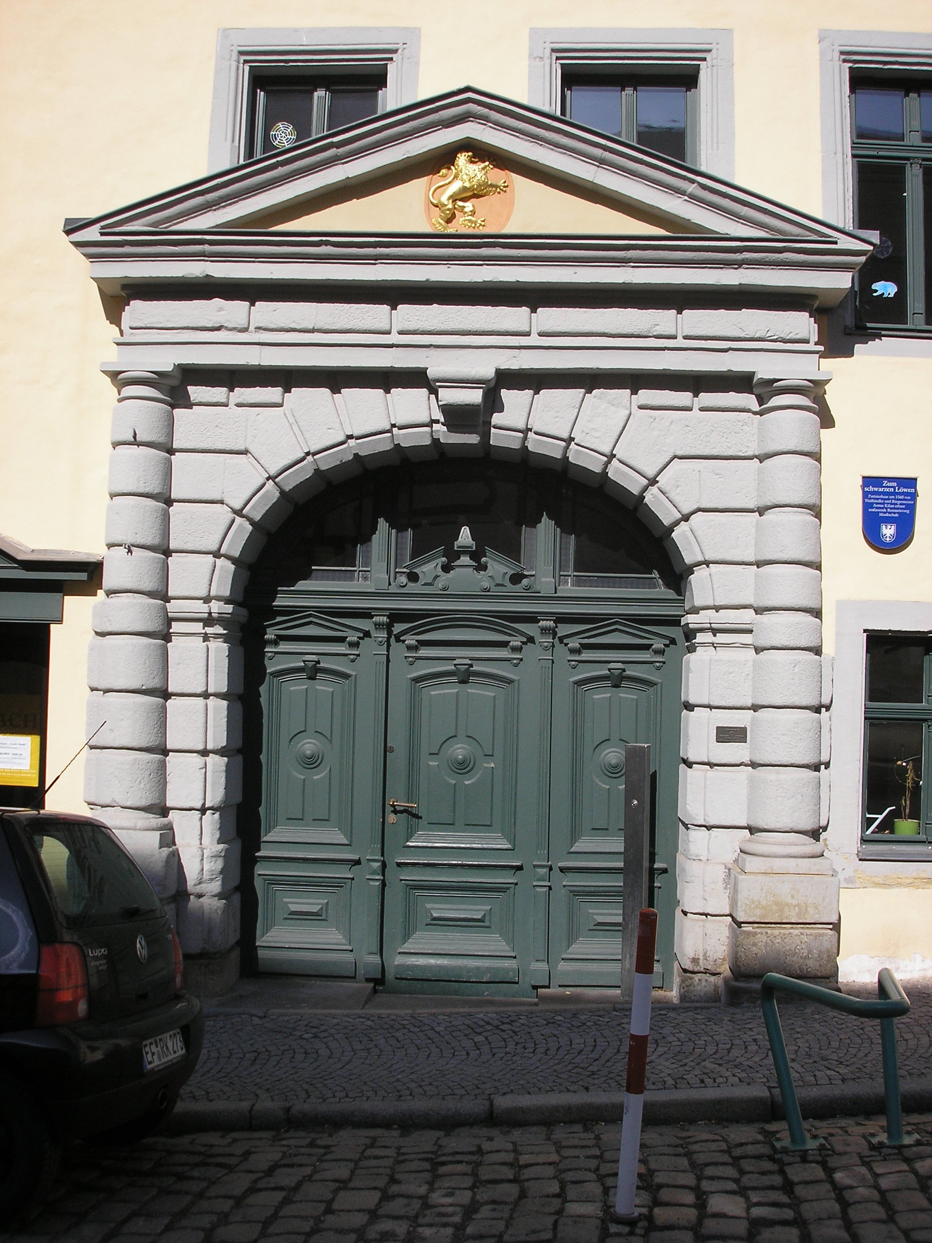 Das Portal des Hauses zum schwarzen Löwen am Markt in Arnstadt (Thüringen).